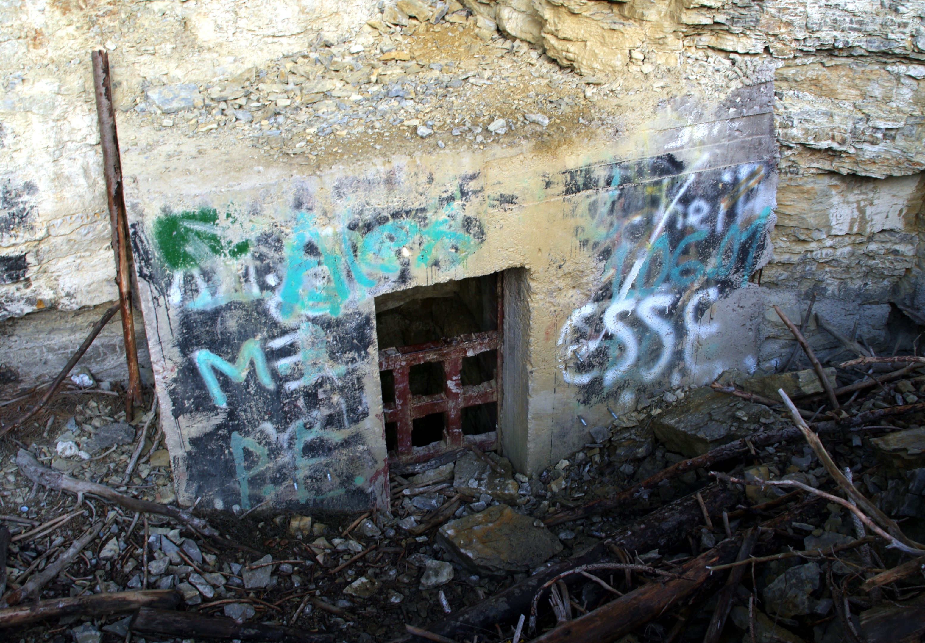 Zugang zu einem Stollen des Sonderbauvorhabens „S III“ im Jonastal (Thüringen)